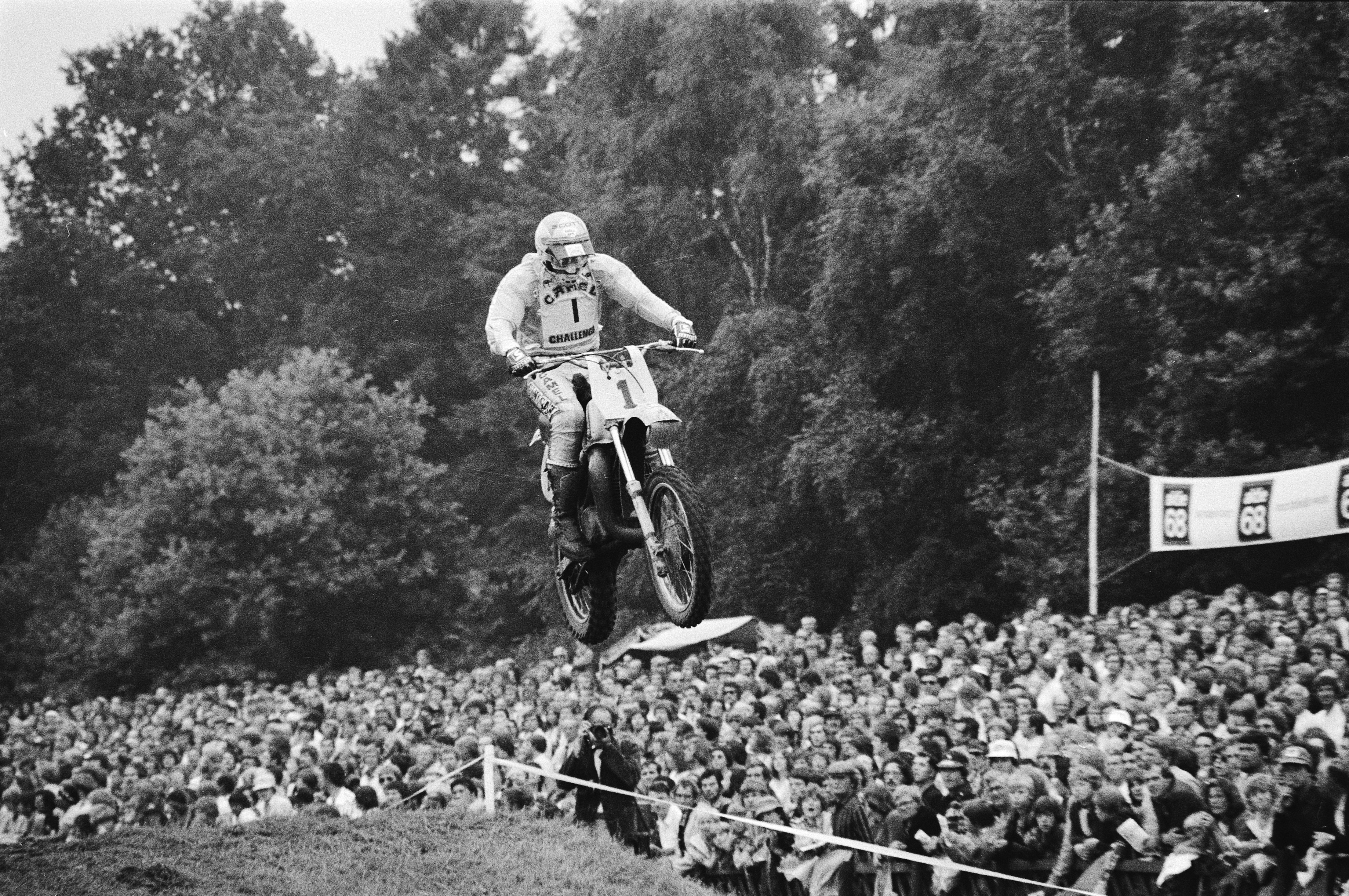 Collectie / Archief : Fotocollectie Anefo Reportage / Serie : Grand Prix Markelo 1979 (motorcros 500 cc) Beschrijving : Gerrit Wolsink (Nederland) in aktie Datum : 28 juli 1979 Locatie : Markelo, Overijsel Trefwoorden : menigte, motorcross, sport Persoonsnaam : Wolsink, Gerrit Fotograaf : Suyk, Koen / Anefo Auteursrechthebbende : Nationaal Archief Materiaalsoort : Negatief (zwart/wit) Nummer archiefinventaris : bekijk toegang 2.24.01.05 Bestanddeelnummer : 930-3776